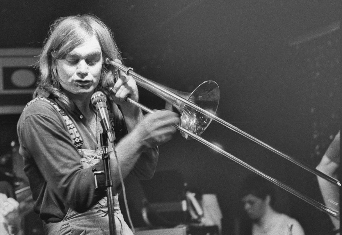 Achim Fink mit Padlt Noidlt im Club "Logo" in Hamburg, 07. Januar 1980